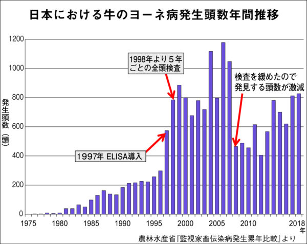 農水省の統計に見るヨーネ病の摘発頭数の推移